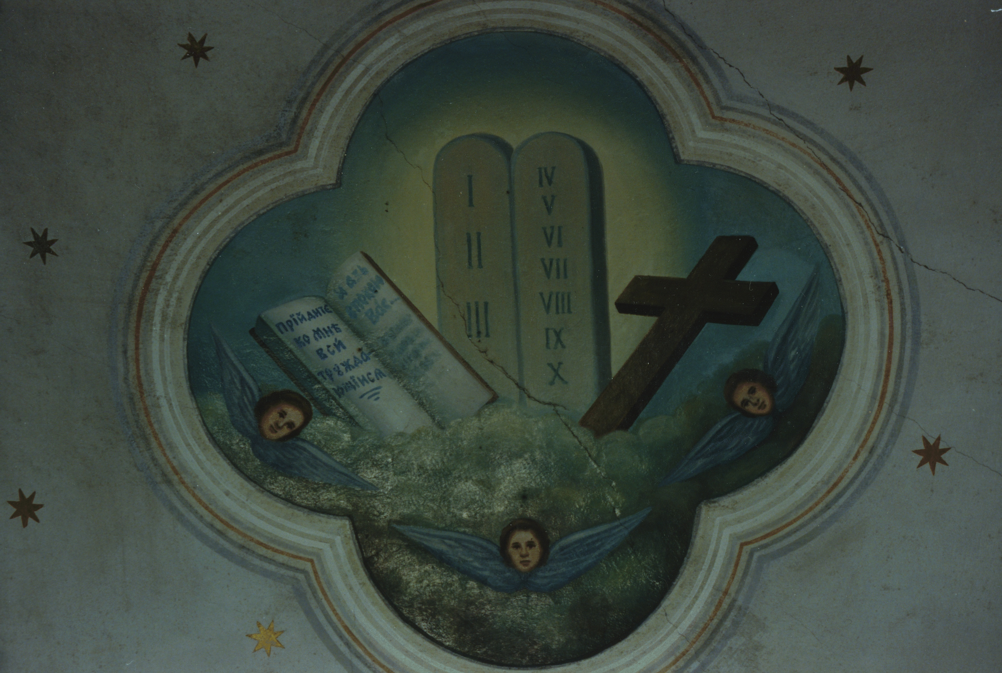 Božie prikázania, freska v gr. kat. cerkvi v Krásnom Brode, okr. Medzilaborce, foto z r. 1991. Photo taken by Jozafát Vladimír Timkovič, OSBM